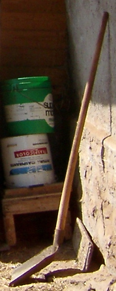 Schaufel (in Aiarei, Wengen)